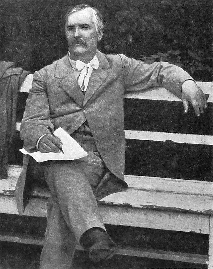 Лысенко, Николай Витальевич